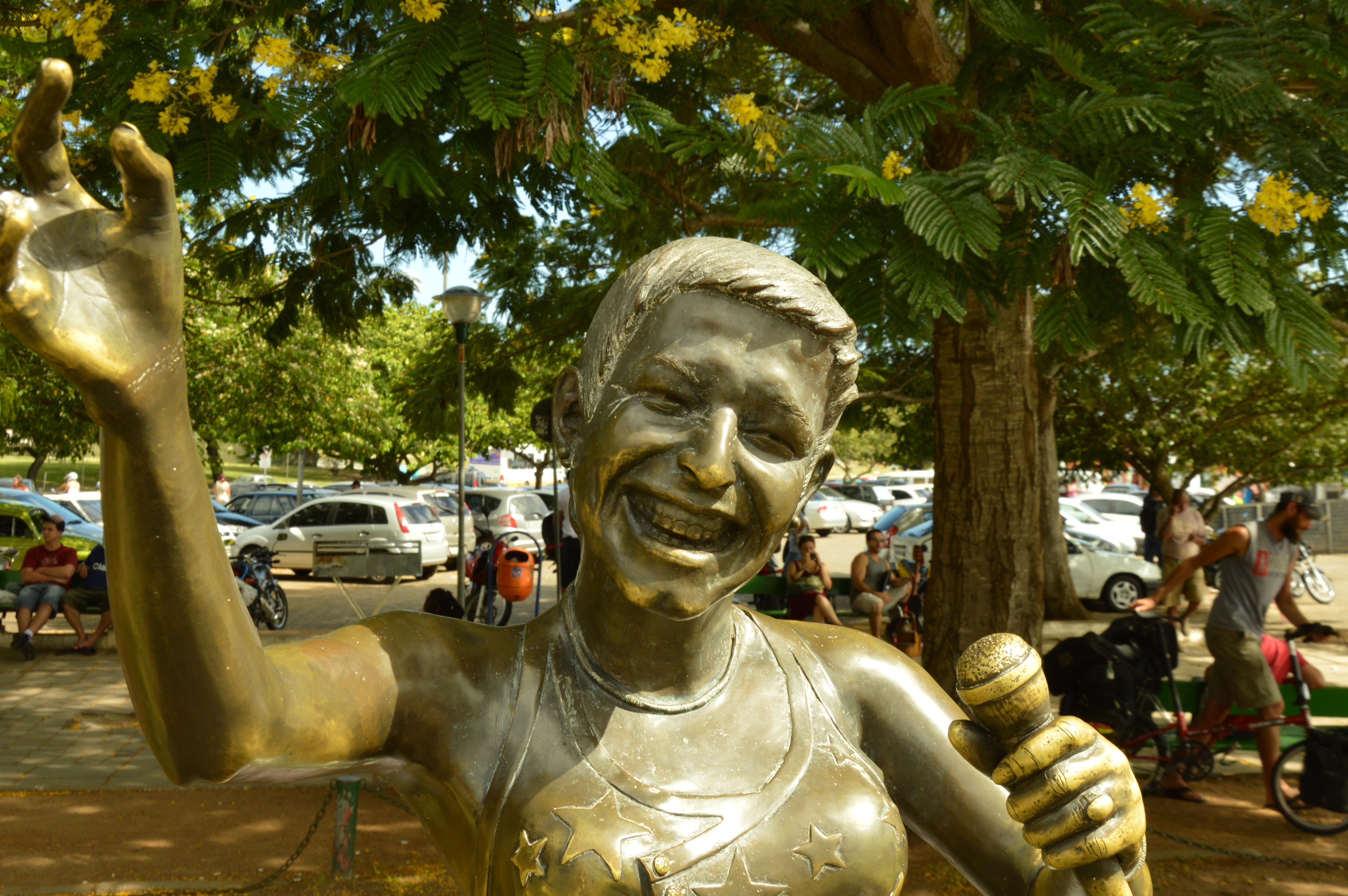 Estátua da Elis Regina de de autoria do artista plástico José Pereira Passos